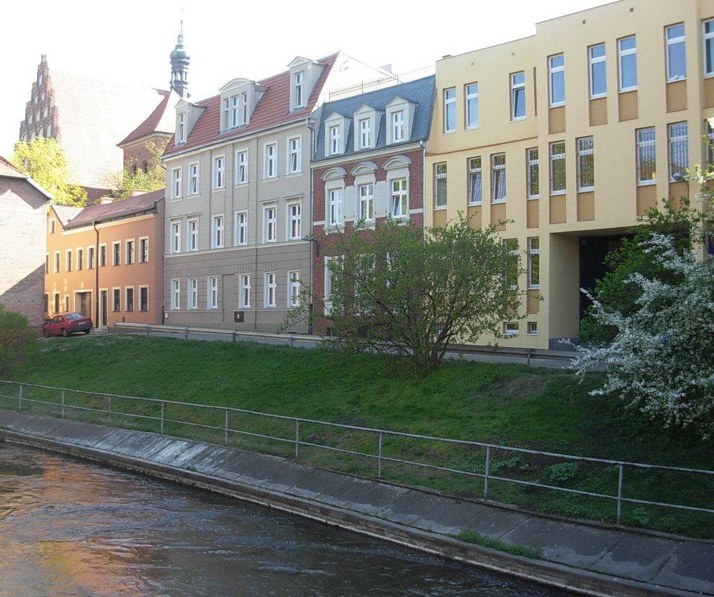 Ulica Przyrzecze w Bydgoszczy